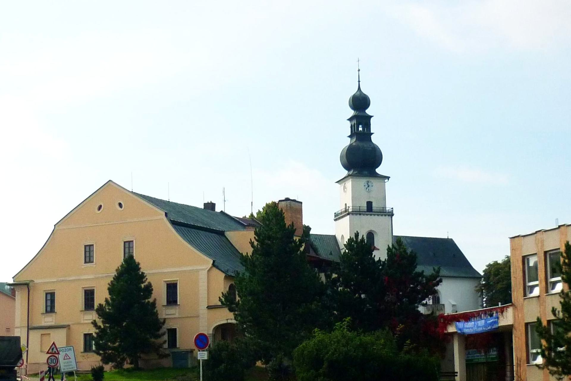 Farní kostel Sv. Prokopa ve Žďáru nad Sázavou